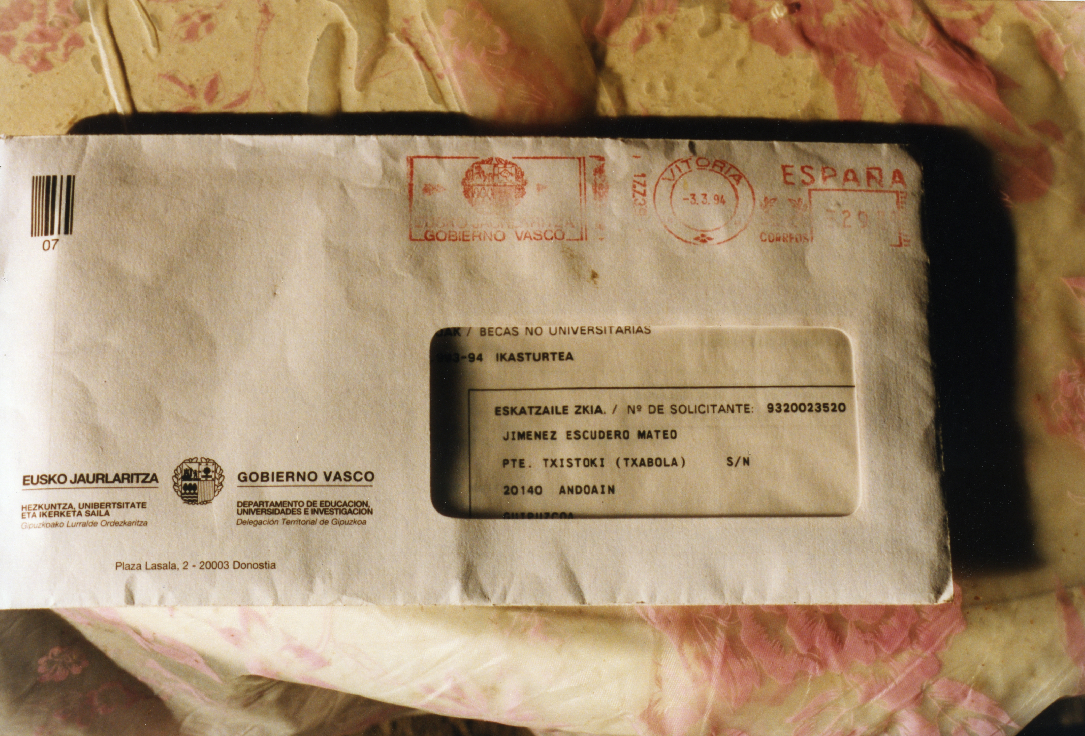 Txistokiko zubia helbidea duen gutuna, ijito familiari zuzendua. Aiurri 0 zbk. 19. orr.